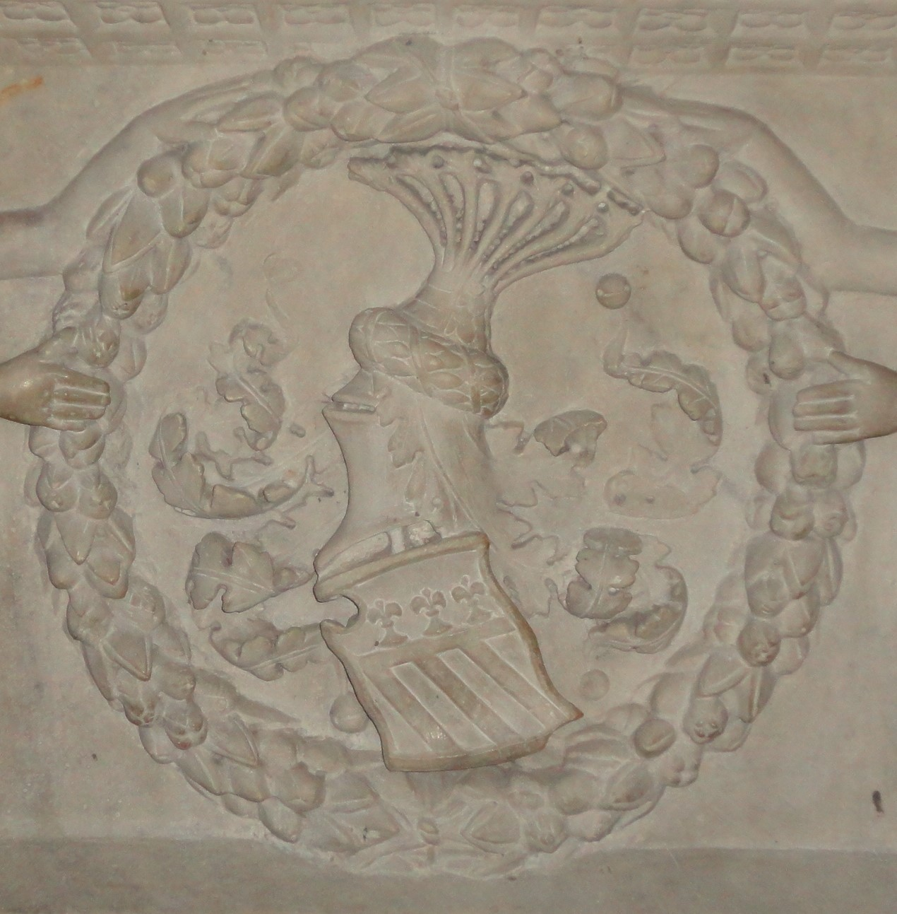 Stemma tomba giacomo rocco in san lorenzo maggiore - napoli